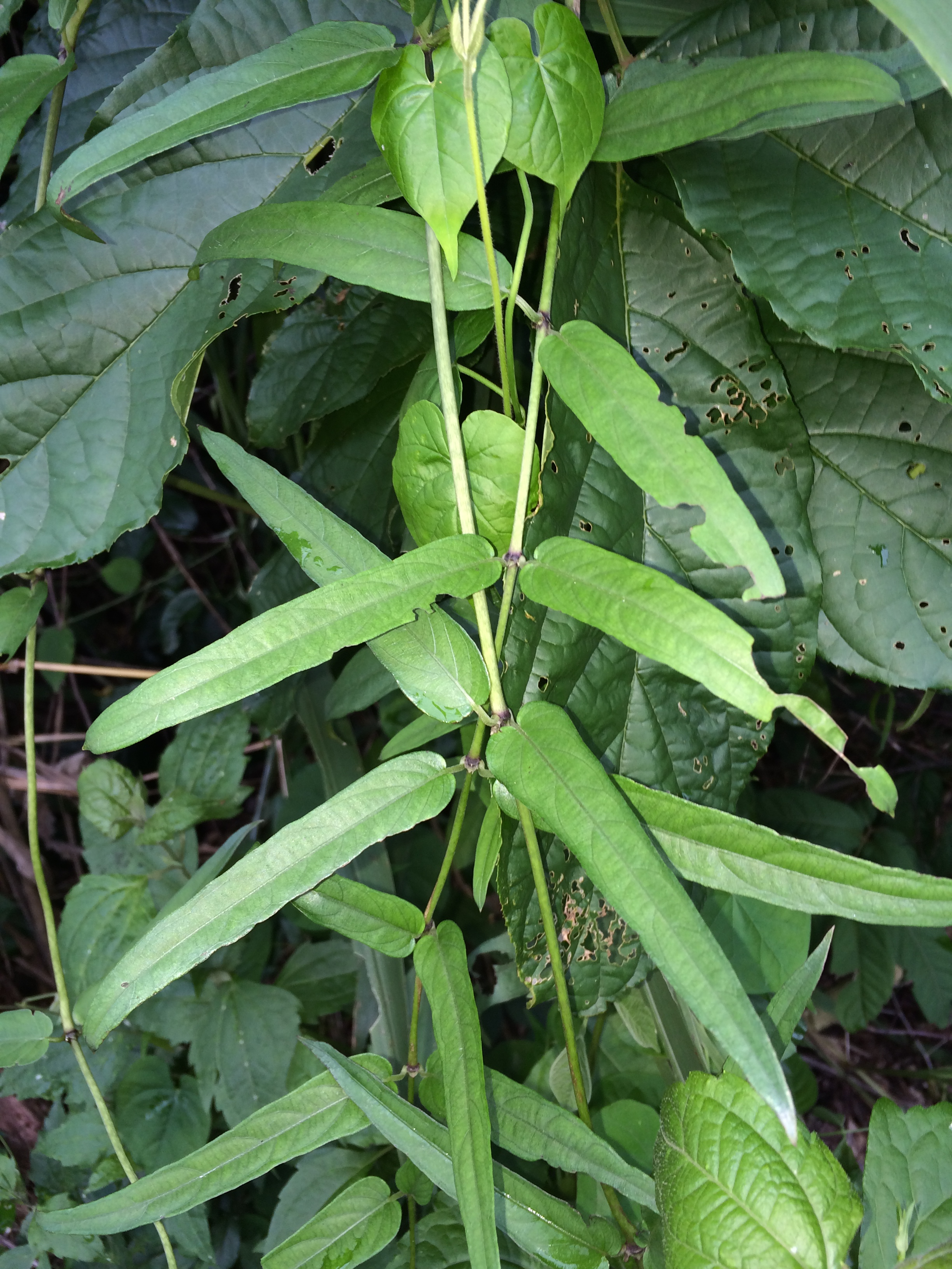 Creua thot ma เคริอตดหมา Paederia linearis Hook